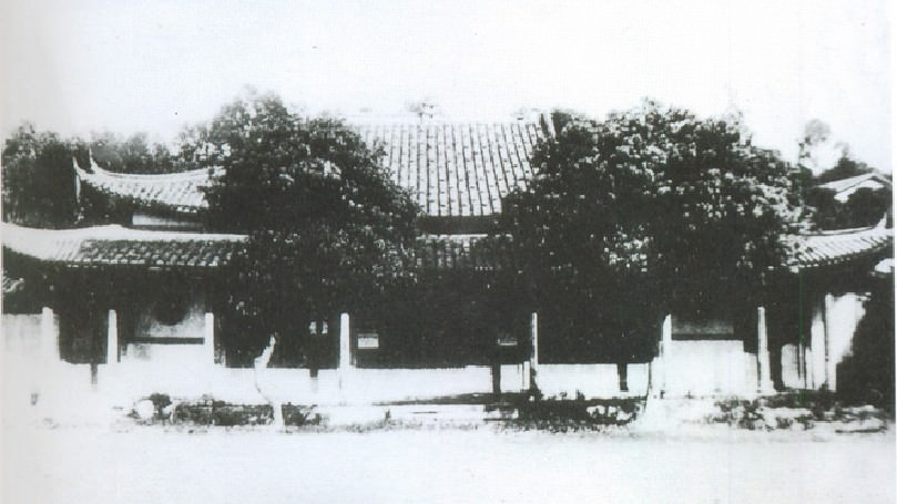 二十世纪五十年代的福州华林寺大殿